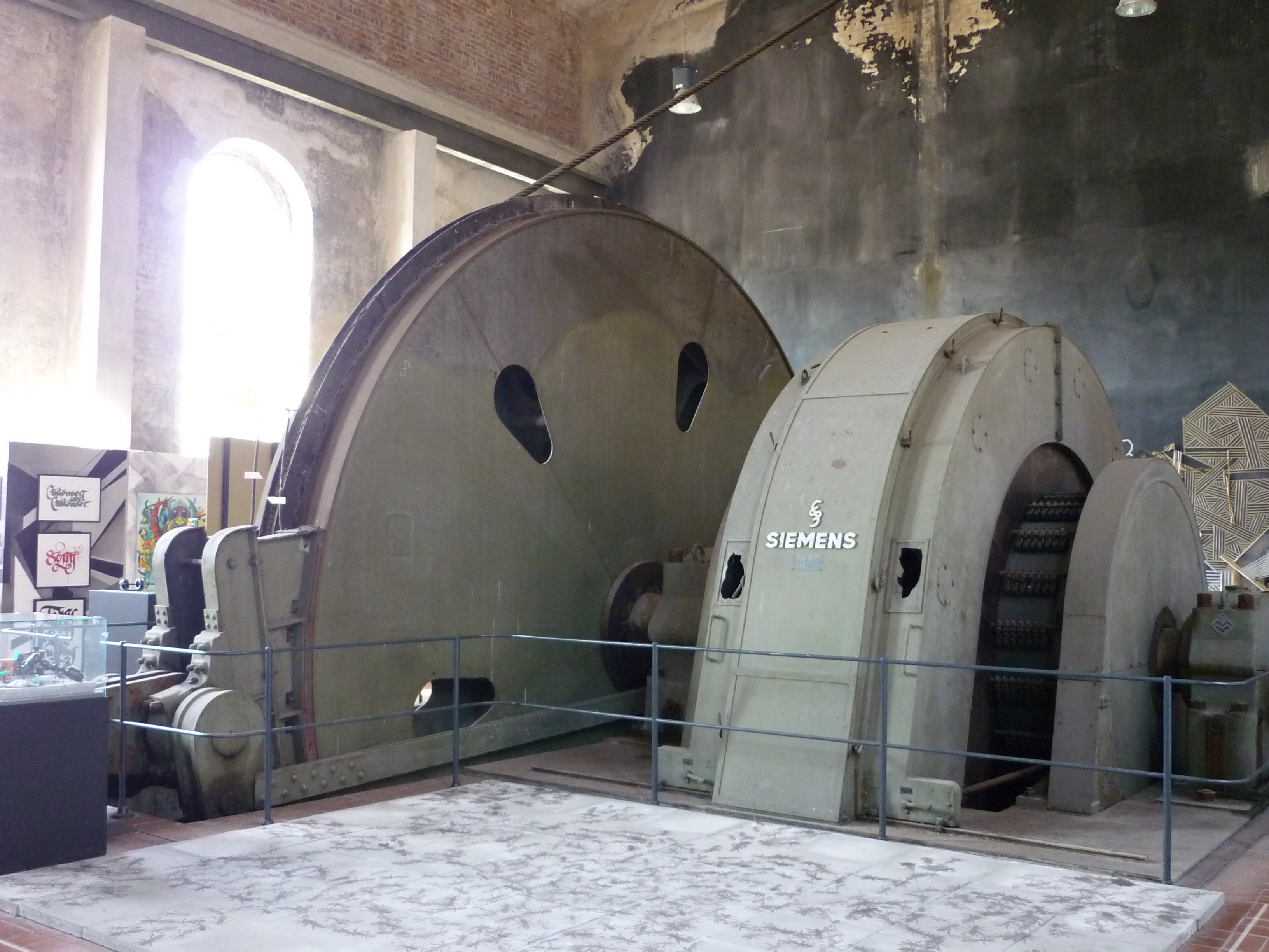 Elektrische Fördermaschine von Siemens an Schacht 1, Zeche Zollverein